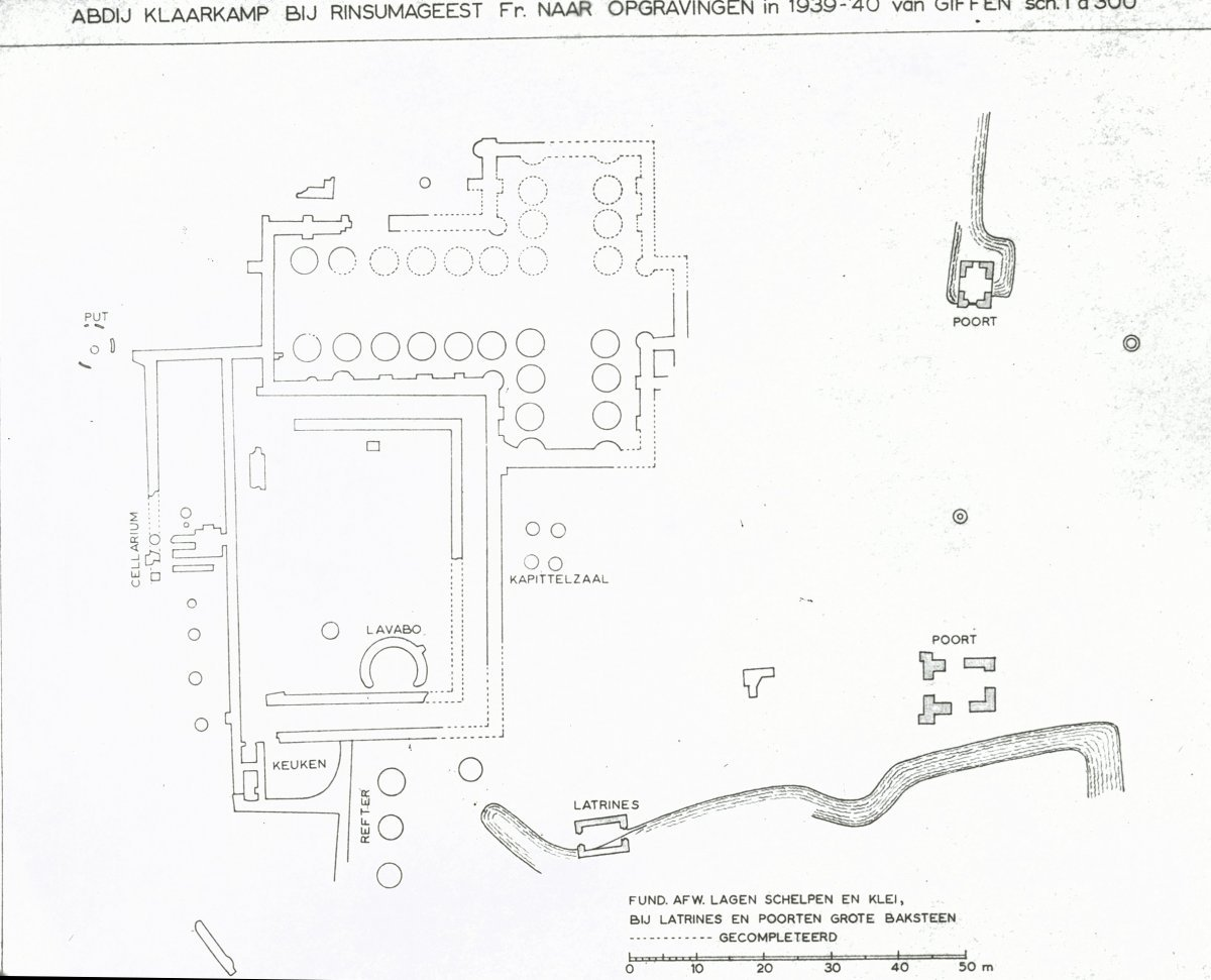 KLOOSTER (ABDIJ) KLAARKAMP: Exterieur TEKENING, OPGRAVINGSKAART (PLATTEGROND)